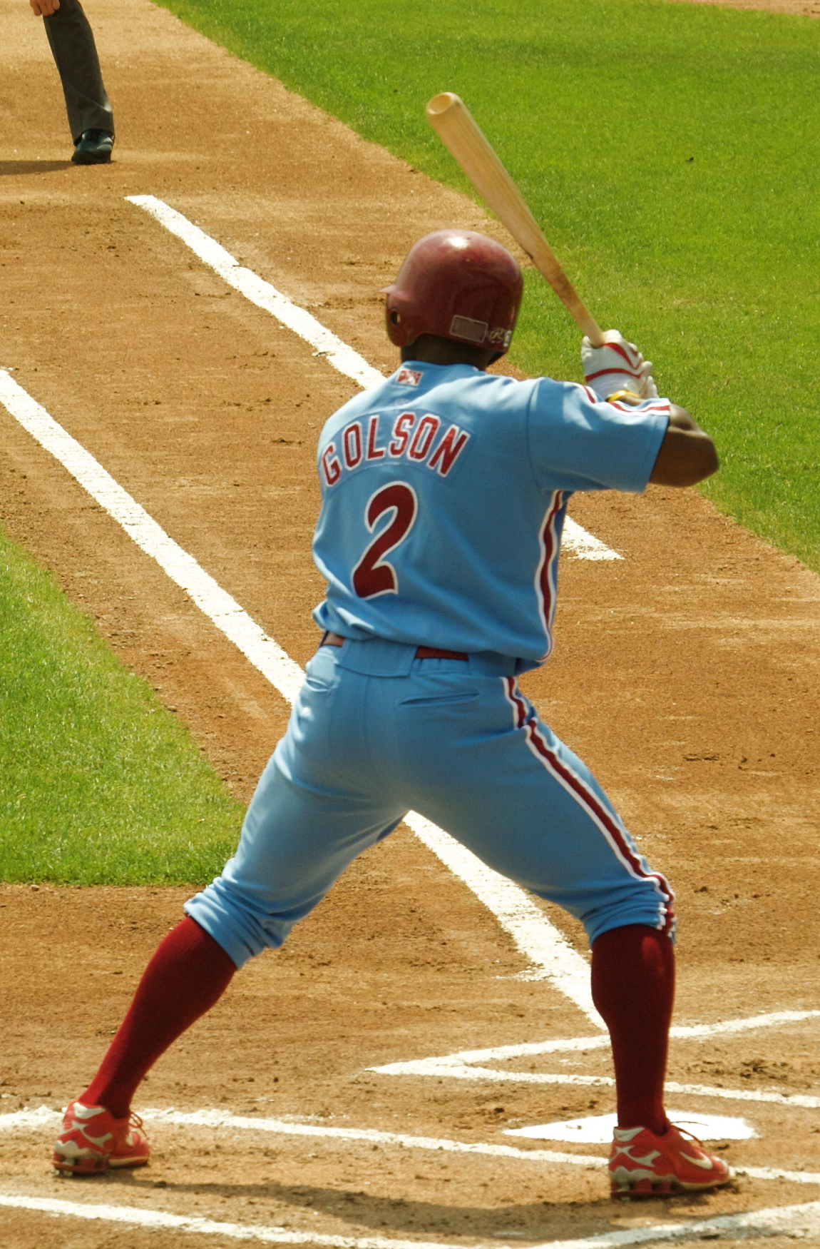 Greg Golson